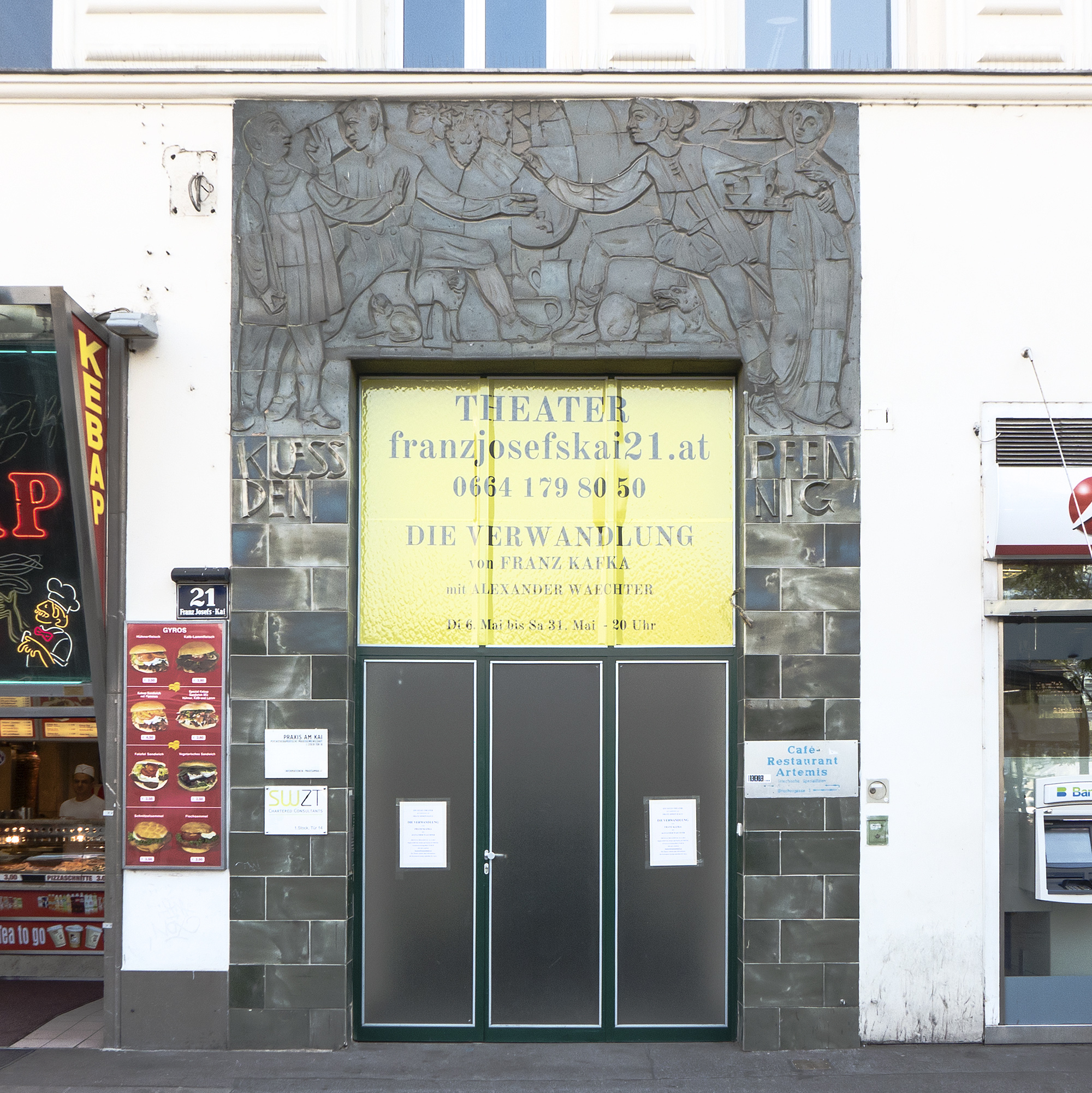 Theater fjk21 am Franz-Josefs-Kai 21 in Wien 1